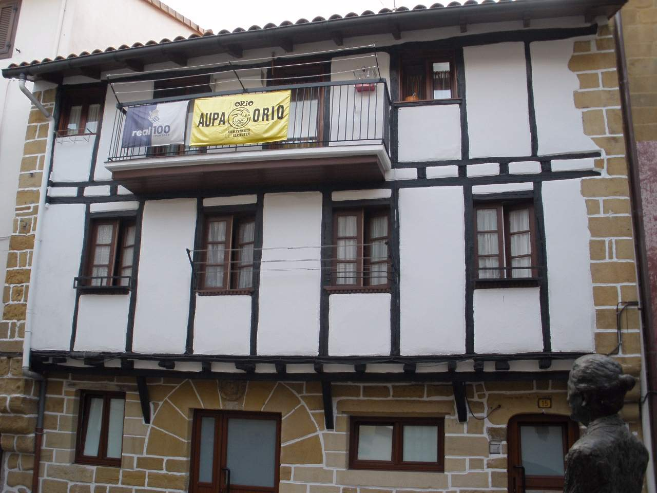 Orio (Gipuzkoa)